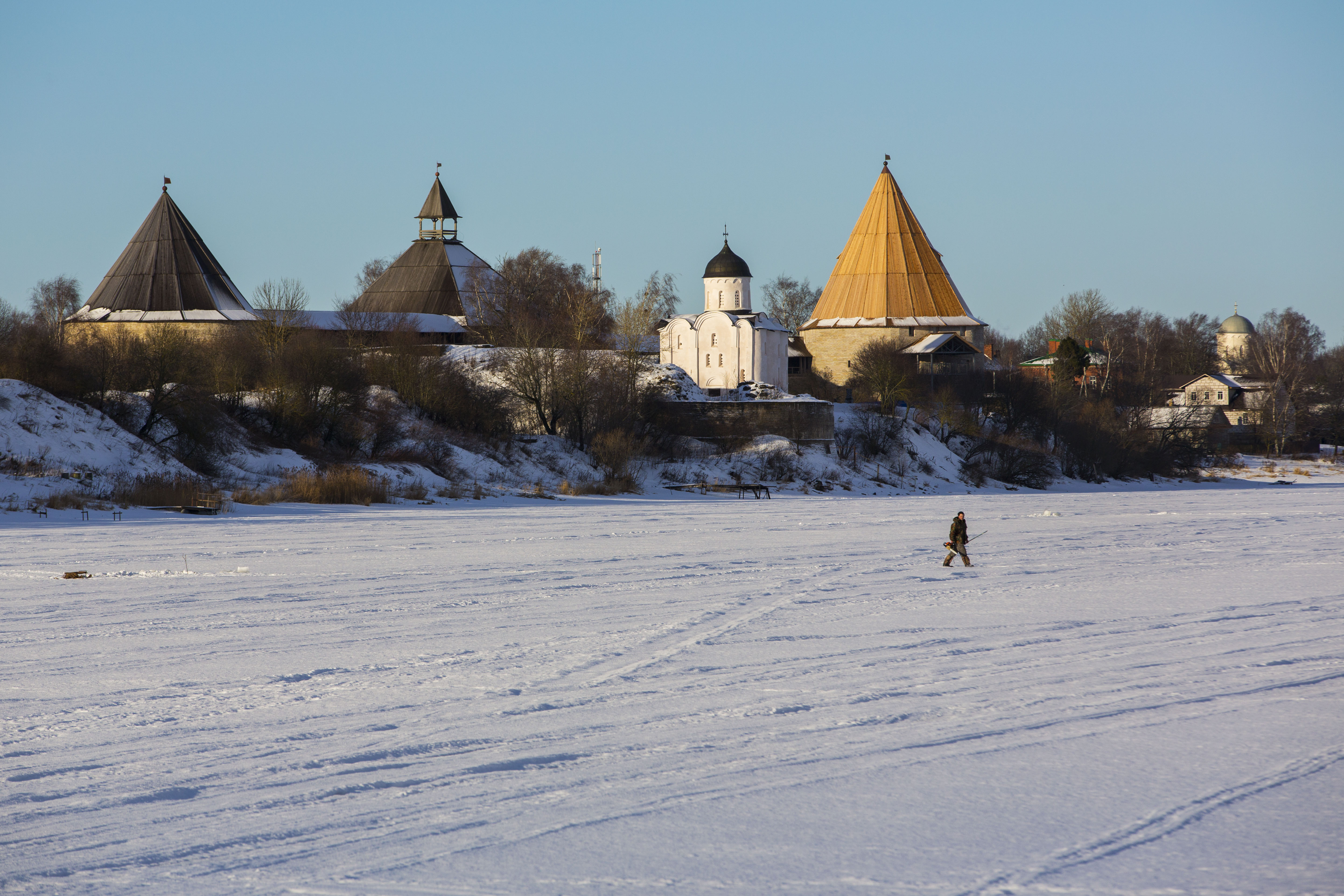 Крепость "Старая Ладога": Старая Ладога, Старая Ладога, Волховский район, Ленинградская область